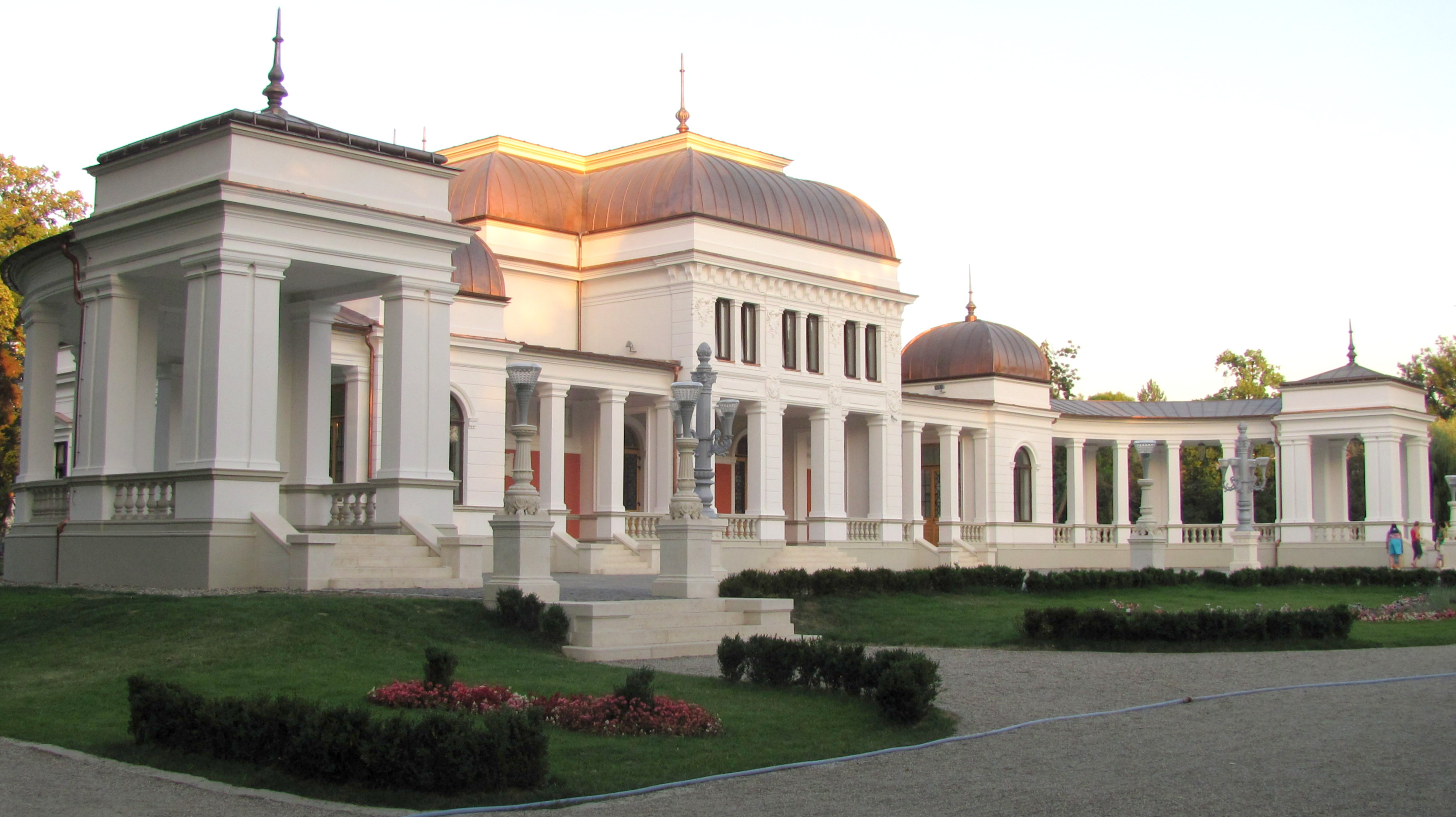 Cluj-Napoca - Parcul Simion-Bărnuțiu - Pavilion expozițional 05